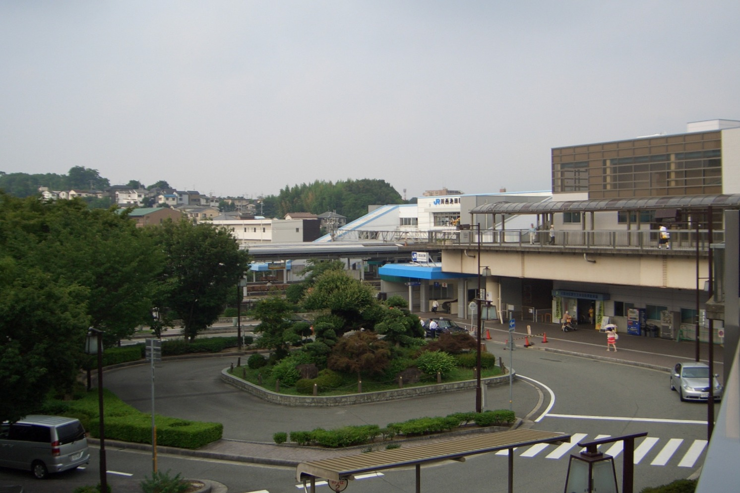 西日本旅客鉄道福知山線（JR宝塚線）川西池田駅、北口のロータリーを望む